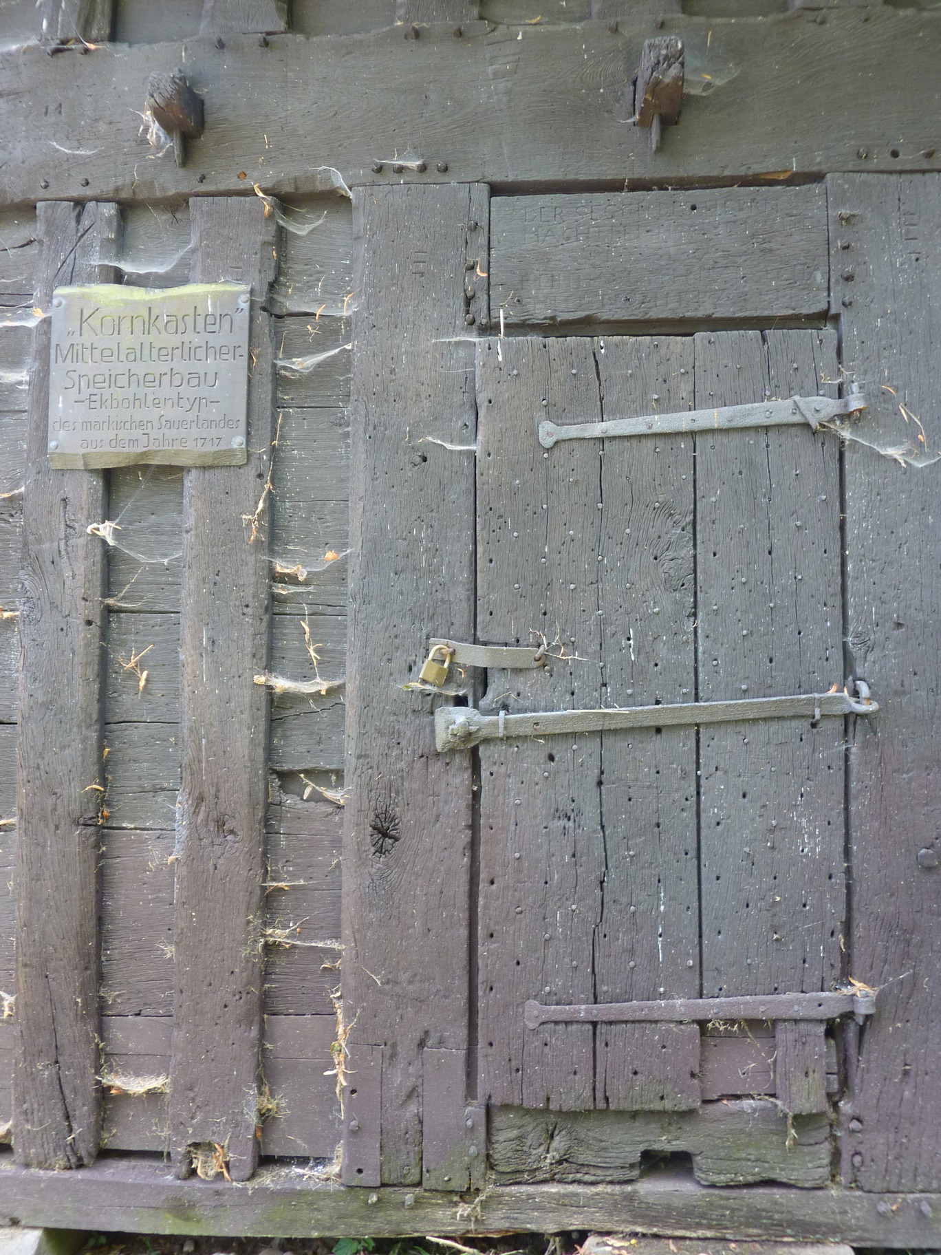 Kornkasten in Ennepetal-Rüggeberg, TüreThis is a photograph of an architectural monument., no. 0